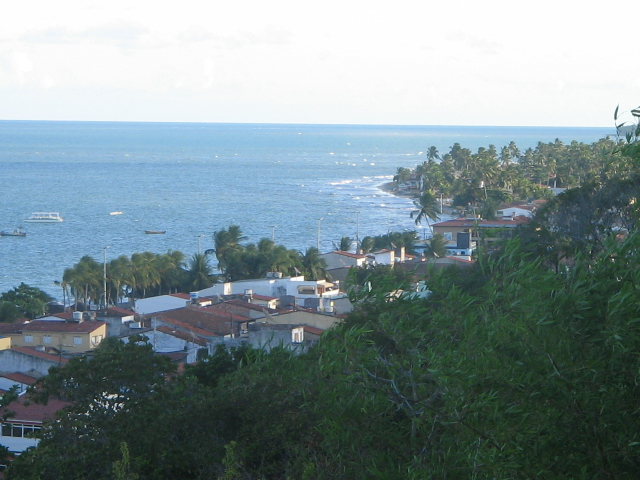 Cidade de Maragogi, Alagoas, Brasil.